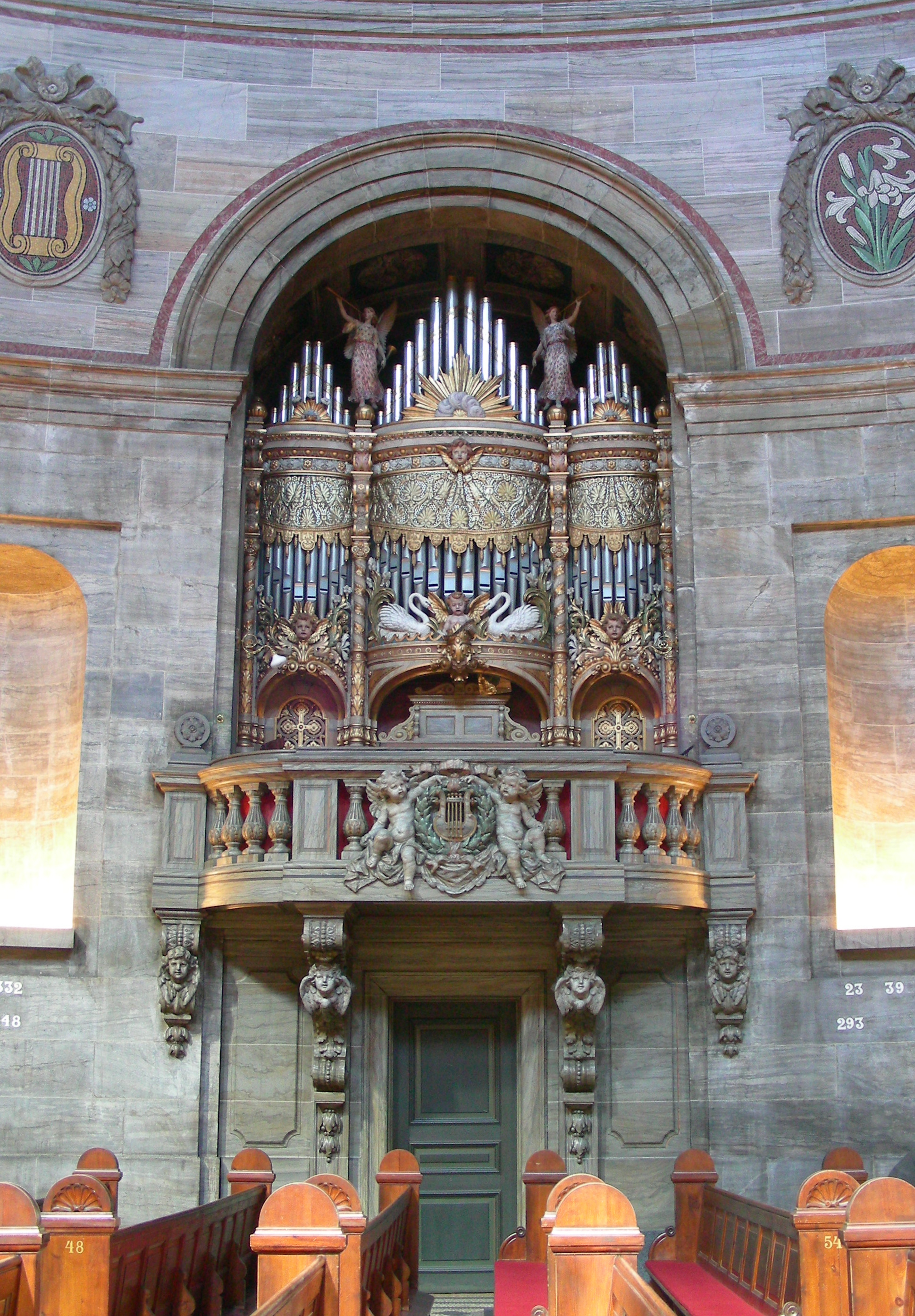 Marmorkirken, Copenhagen, Denmark. Old organ front.